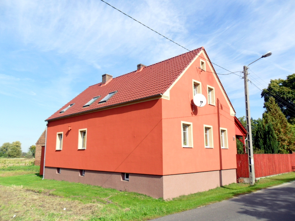 dom, XVIII Czarnowice, nr 32 09.1964.